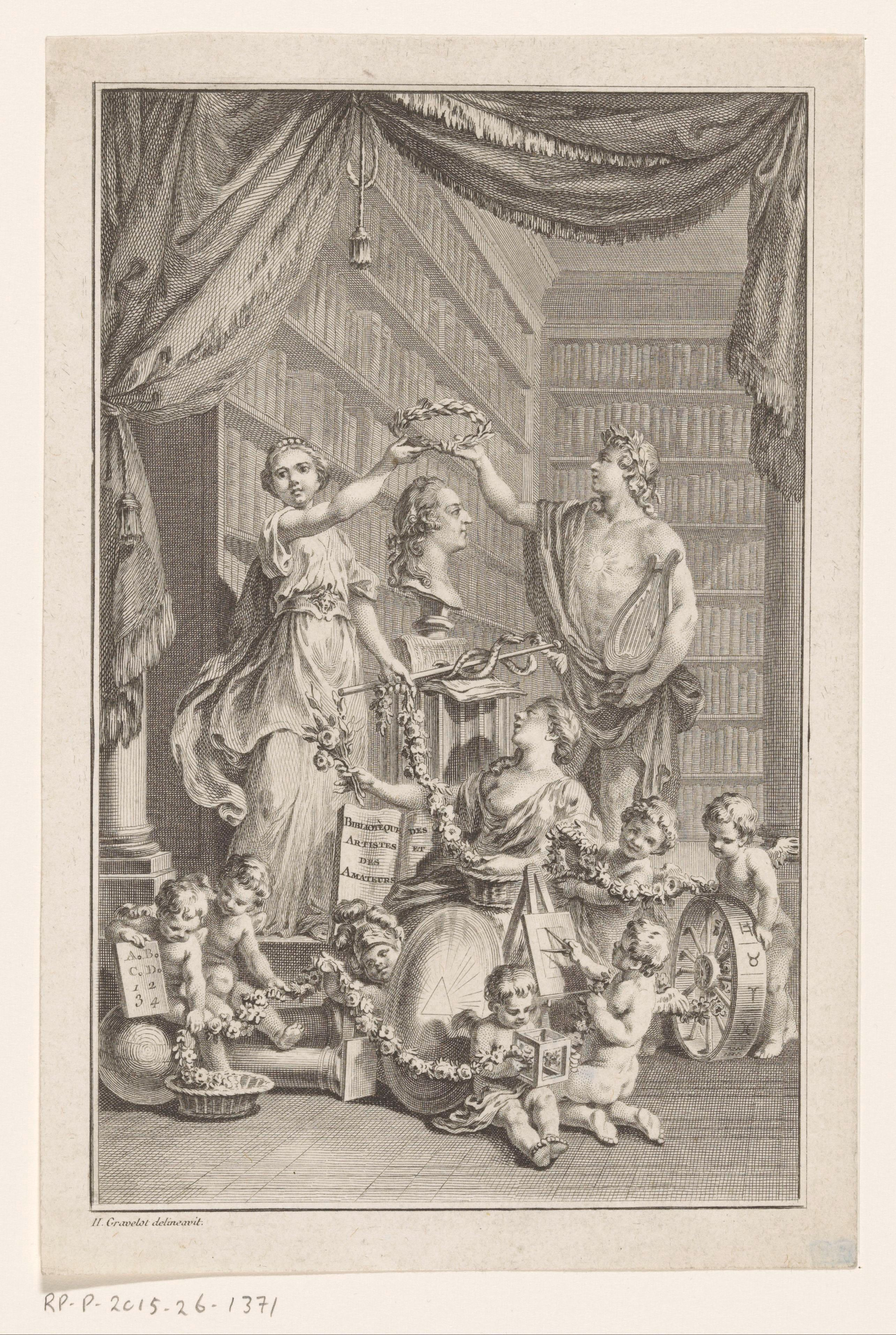 IdentificatieTitel(s): Allegorische voorstelling met de buste van Lodewijk XV van FrankrijkTitelpagina voor: Jean-Raymond de Petity, Bibliothèque des artistes et des amateurs, 1766Objecttype: prent titelpagina Objectnummer: RP-P-2015-26-1371Catalogusreferentie: Aantal staten bekend 1(2)Opmerking: voor de naam van de prentmakerOpschriften / Merken: verzamelaarsmerk, verso, gestempeld: Lugt 2228verzamelaarsmerk, verso, gestempeld: Lugt 4779verzamelaarsmerk, verso, gestempeld: Lugt 4780Omschrijving: Apollo en de personificatie van de wetenschappen houden een kroon boven de buste van Lodewijk XV van Frankrijk. Op de voorgrond zeven putti met attributen die verwijzen naar de wetenschappen. In de achtergrond staan boekenkasten.VervaardigingVervaardiger: prentmaker: Antoine Jean Duclosnaar tekening van: Hubert François Gravelot (vermeld op object)uitgever: Pierre-Guillaume SimonPlaats vervaardiging: ParijsDatering: 1766Fysieke kenmerken: ets en gravure met stippelwerkMateriaal: papier Techniek: etsen / graveren (drukprocedé) / stippelwerkAfmetingen: blad: h 198 mm × b 131 mmToelichtingPrent gebruikt als titelpagina voor: Petity, Jean-Raymond de. Bibliothèque des artistes et des amateurs. 3 dln. Parijs: Pierre-Guillaume Simon, 1766.OnderwerpWat: Abstract Ideas and Concepts (+ abstract concept represented by female figure)onderwijs, wetenschap en studiespecific aspects, allegorical aspects of Apollo; Apollo as patroncupids: 'amores', 'amoretti', 'putti'bookshelvesWie: Lodewijk XV (koning van Frankrijk)Verwerving en rechtenCredit line: Legaat van de heer S. Emmering, AmsterdamVerwerving: legaat 2000Copyright: Publiek domein